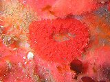 Rostanga bifurcata, puesta de huevos,Parque Marino de Izu, Japón